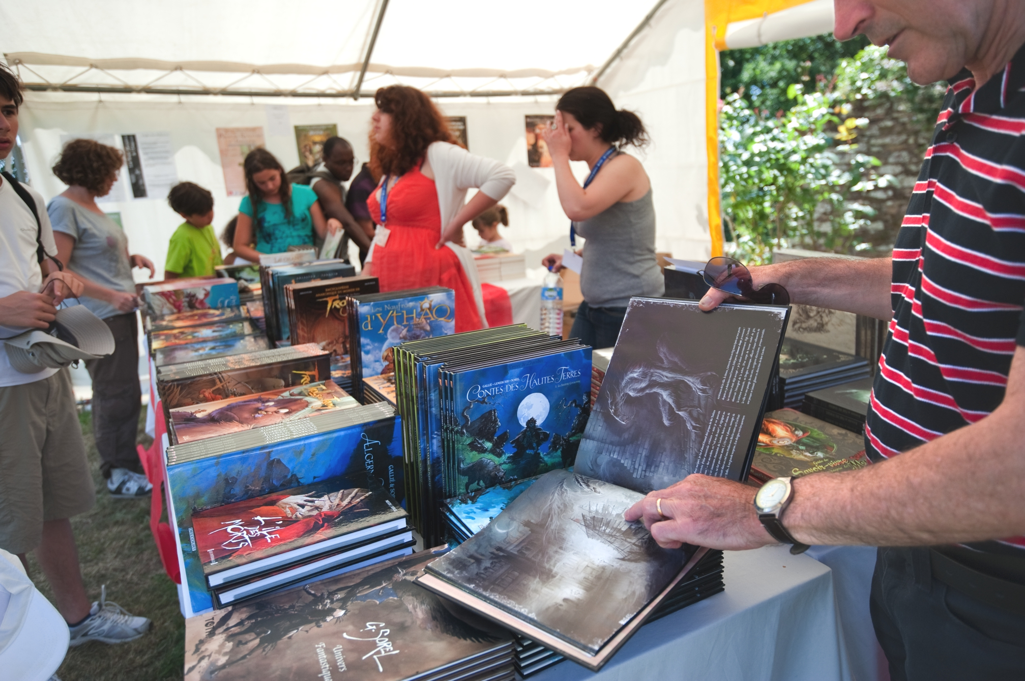 Librairie extérieure tenue par l'équipe du Centre de l'Imaginaire Arthurien lors des 8èmes Rencontres de l'Imaginaire en 2012.